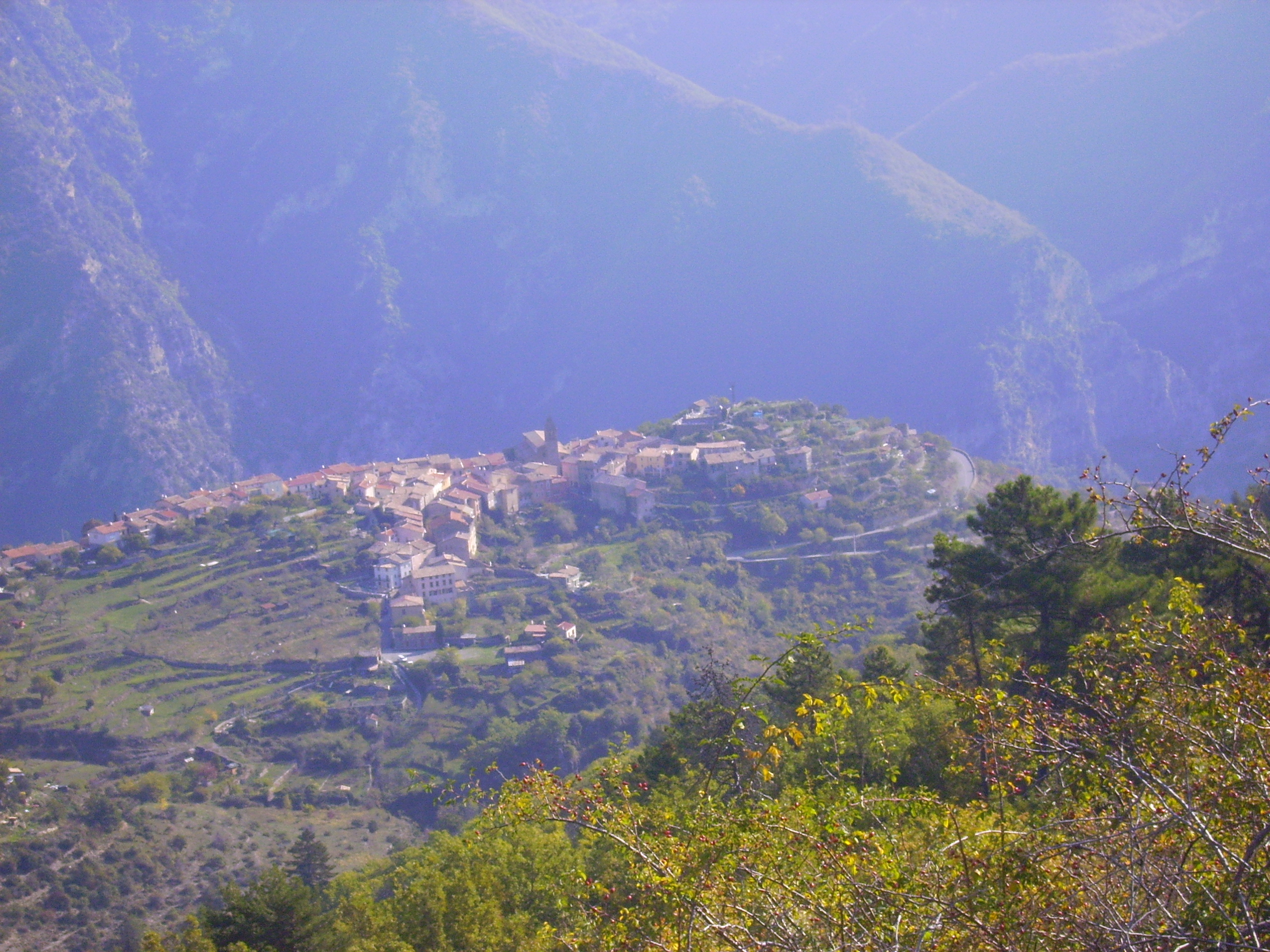 Utelle Alpes-Maritimes